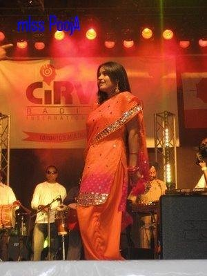 Miss Pooja in Wonderland